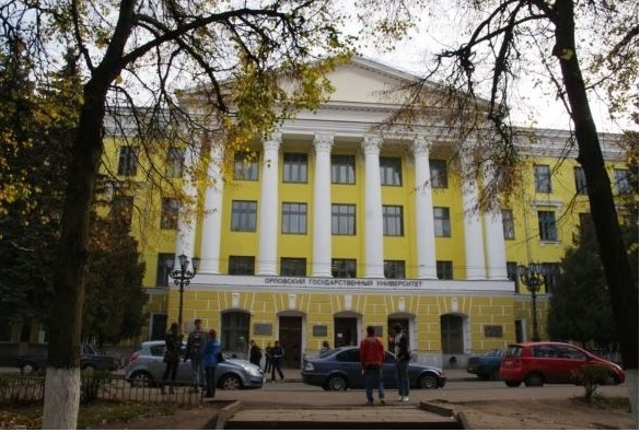 Корпус ОГУ имени И.С.Тургенева